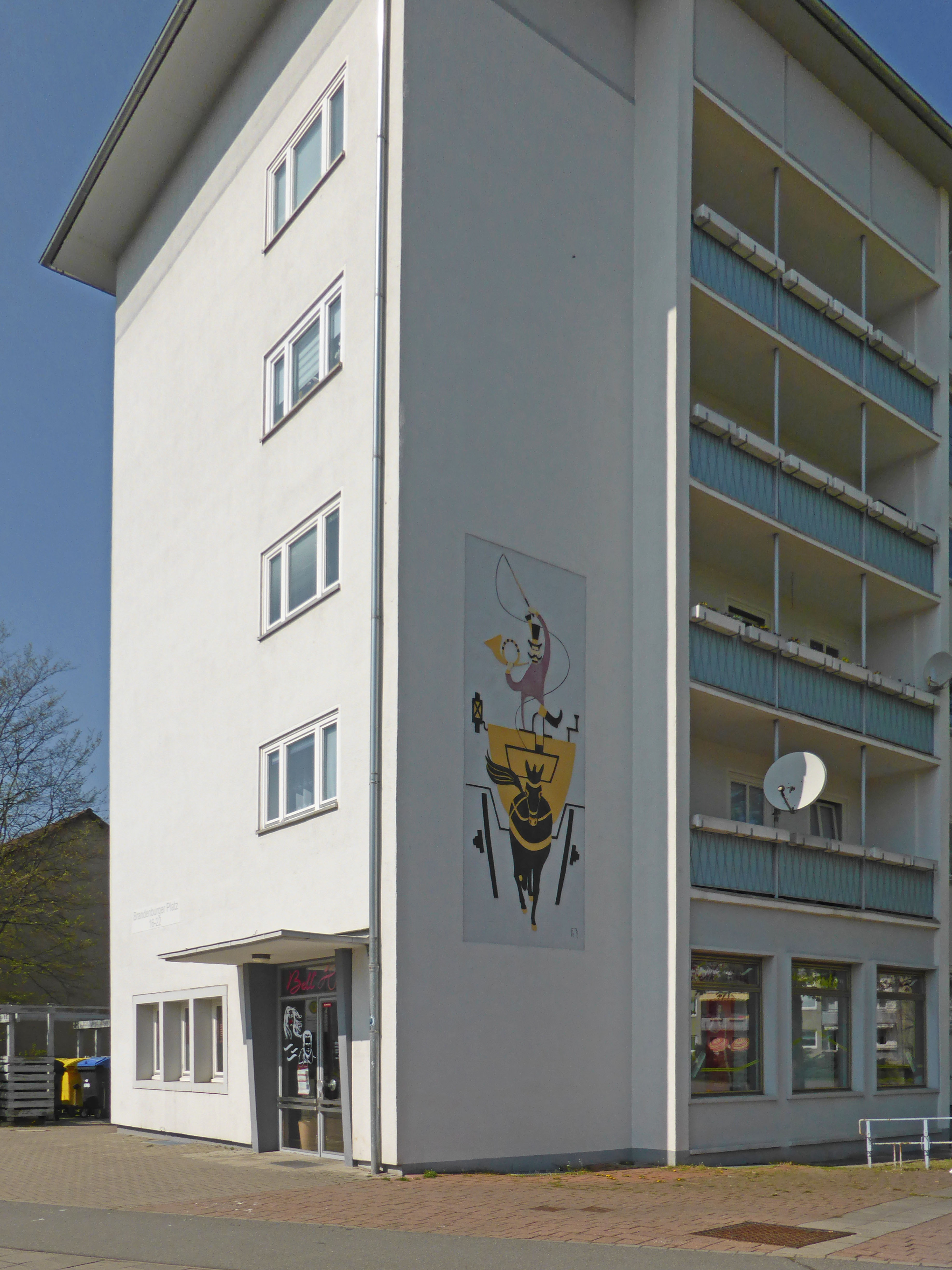 Ehemaliges Postamt Wolfsburg 4 im Stadtteil Wohltberg, Brandenburger Platz 22 (1956 eröffnet)